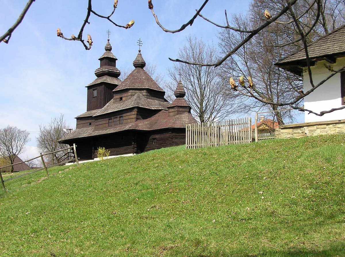 Rigardo je skanseno en Humenne kun ligna preĝejo de vilaĝo Nová Sedlica.